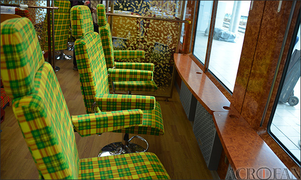 중부내륙순환열차 내부사진